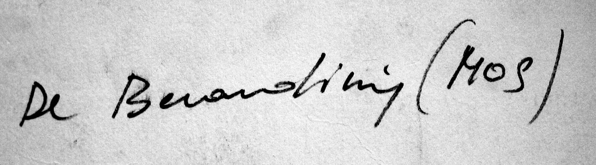 Signature de Mario De Berardinis au dos d'une esquisse pour une affiche de cinéma